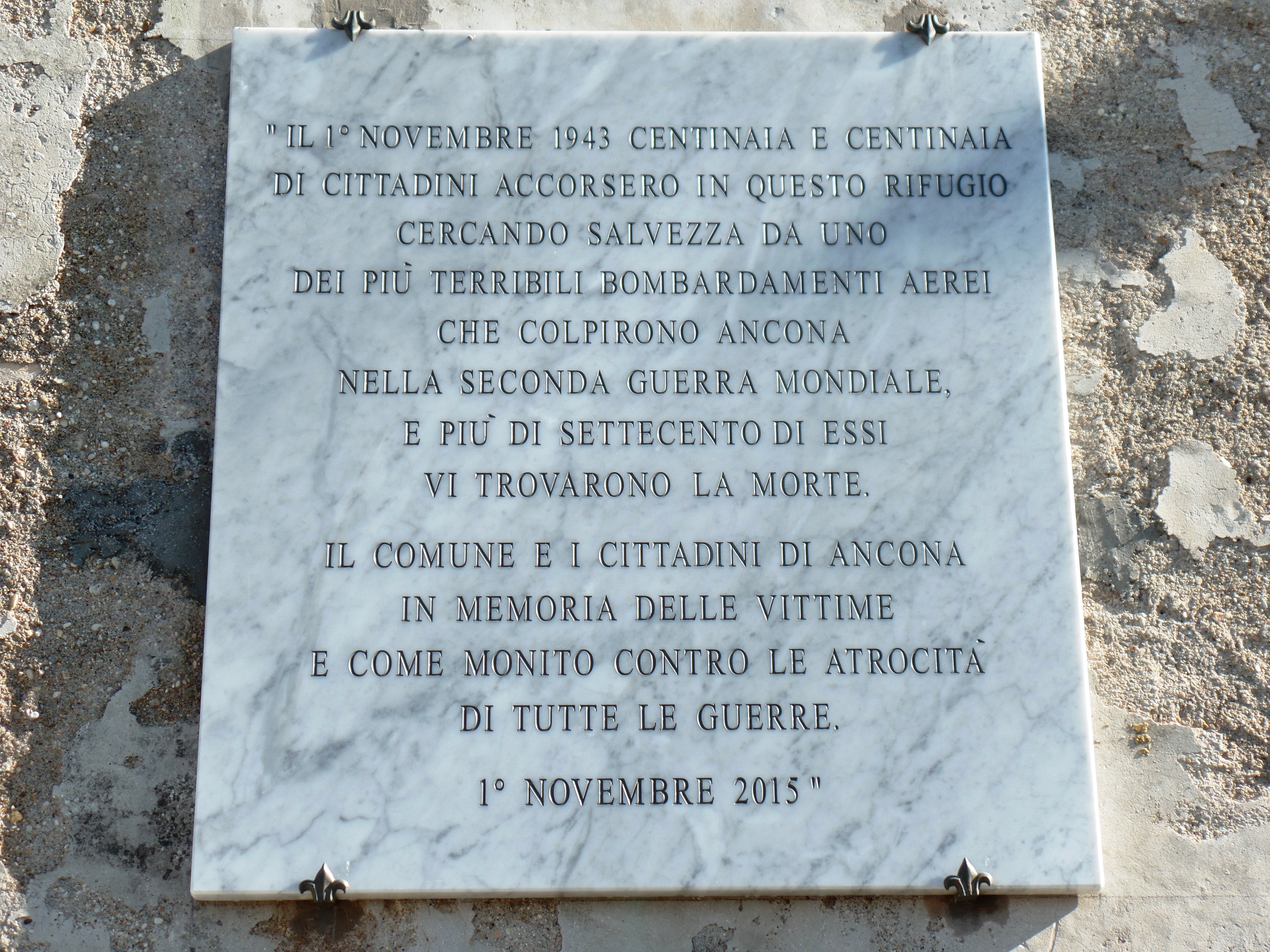 Ancona nuova targa morti rifugio carceri 1-11-1943